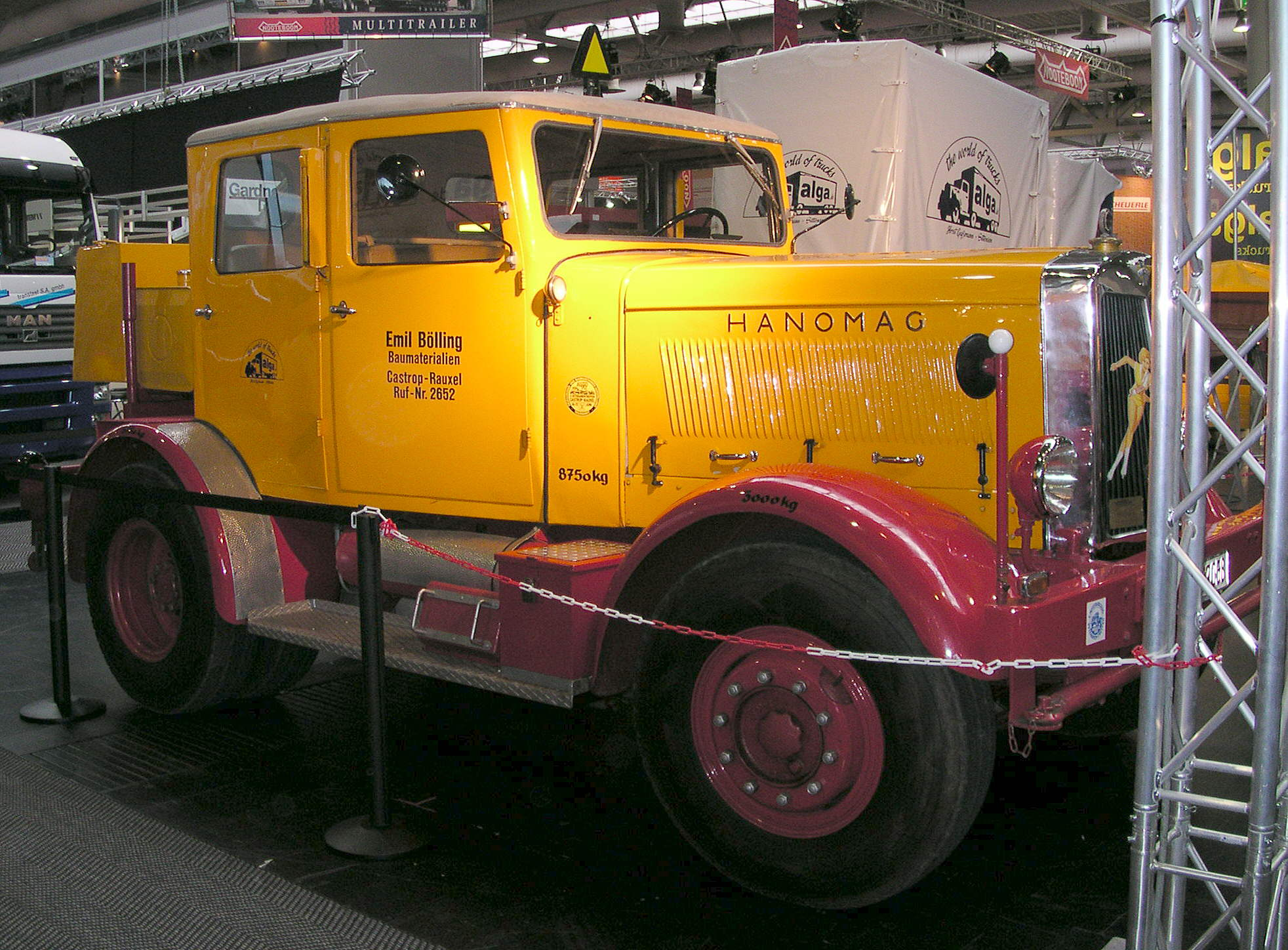 Nutzfahrzeug-IAA 2004 in Hannover, Hanomag ST 100, Baujahr 1947, am Stand der Firma ALGA